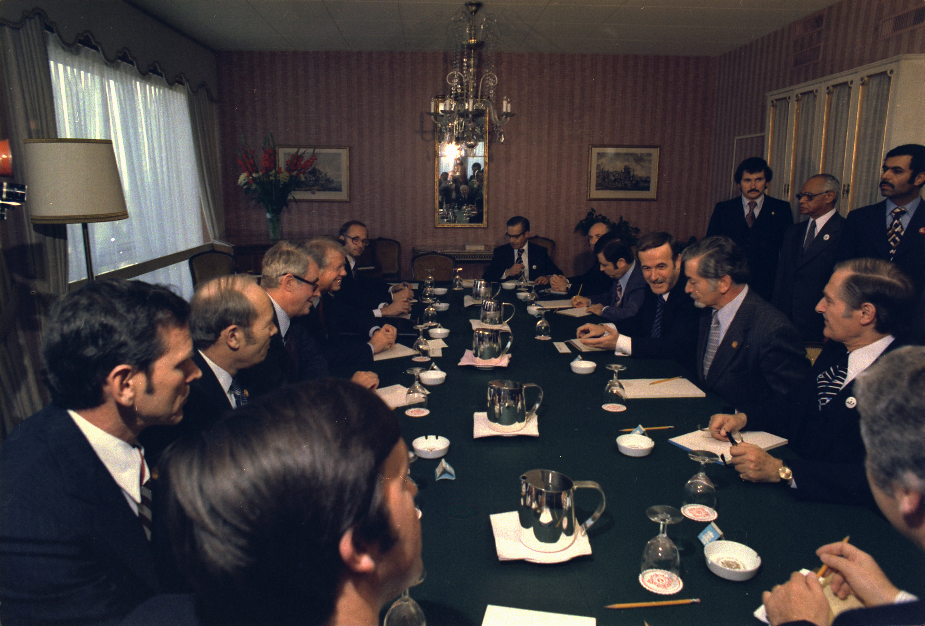 جيمي كارتر وحافظ الأسد خلال لقاء بين المسؤولين الأمريكيين والسوريين